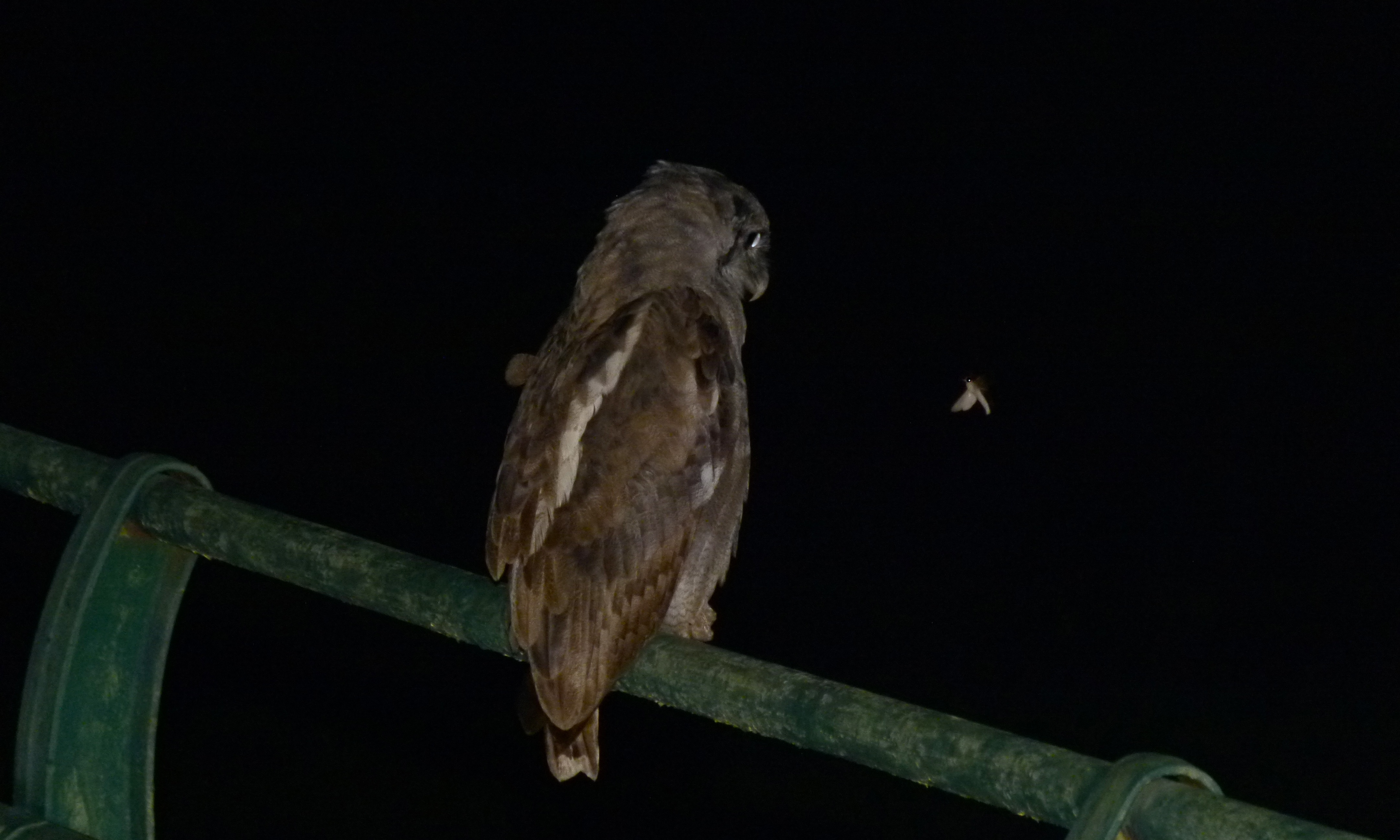 H1-4 Olifants Bridge, Kruger NP, SOUTH AFRICA